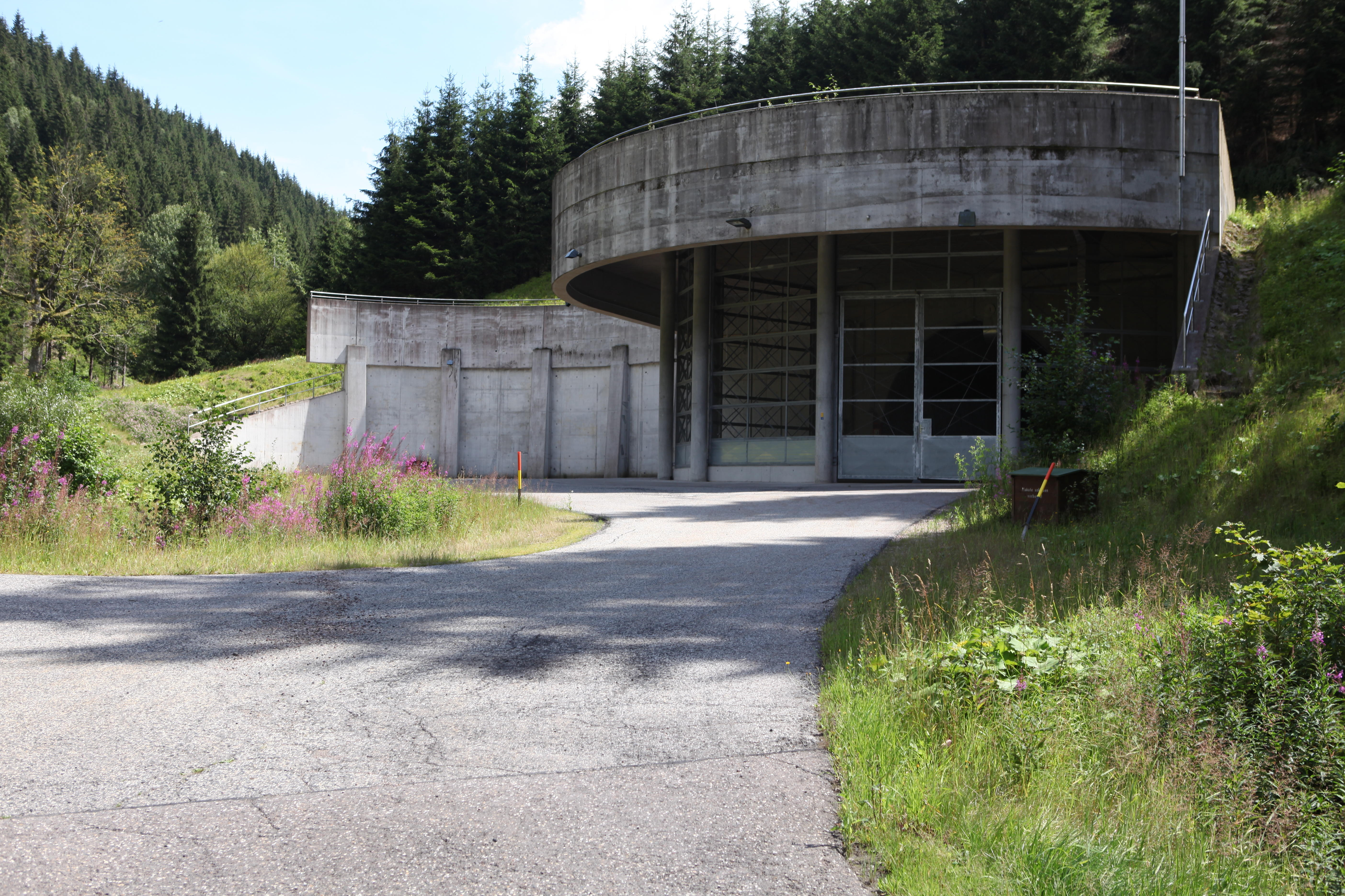 Stollen der Luftaustauschzentrale Floßgraben des Rennsteigtunnels